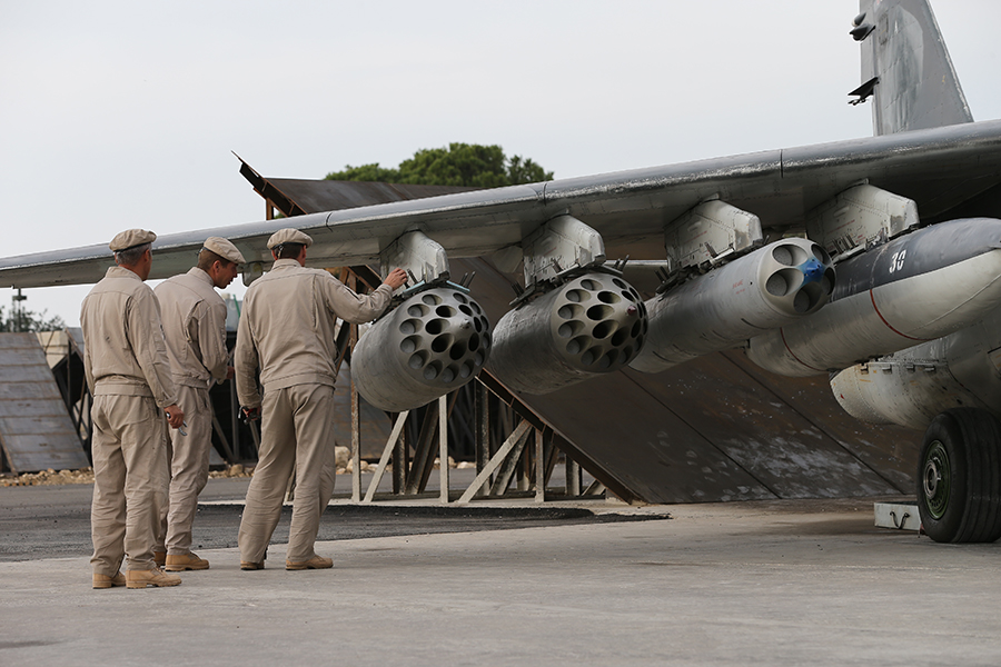 Будни авиагруппы ВКС РФ на аэродроме «Хмеймим» (Сирийская Арабская Республика)